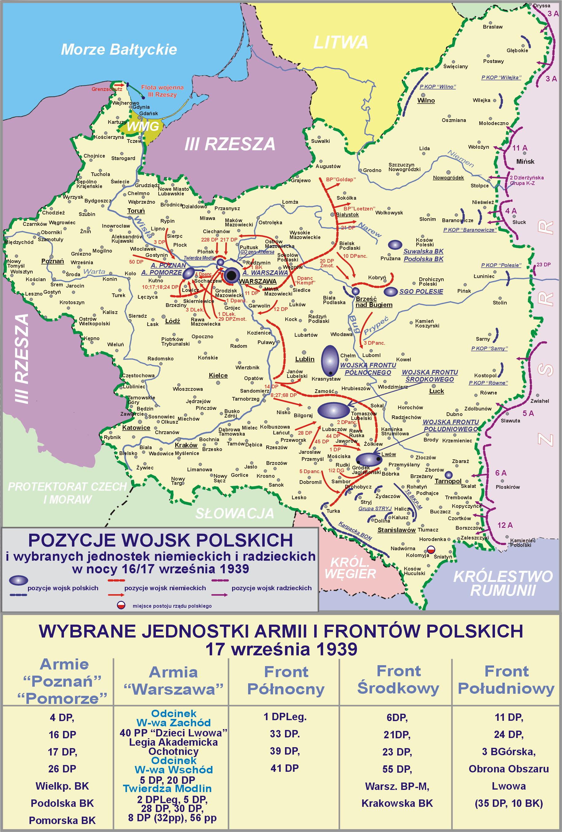 Pozycje wojsk polskich i wybranych jednostek niemieckich i radzieckich 16/17 września 1939 z wykazem jednostek polskich